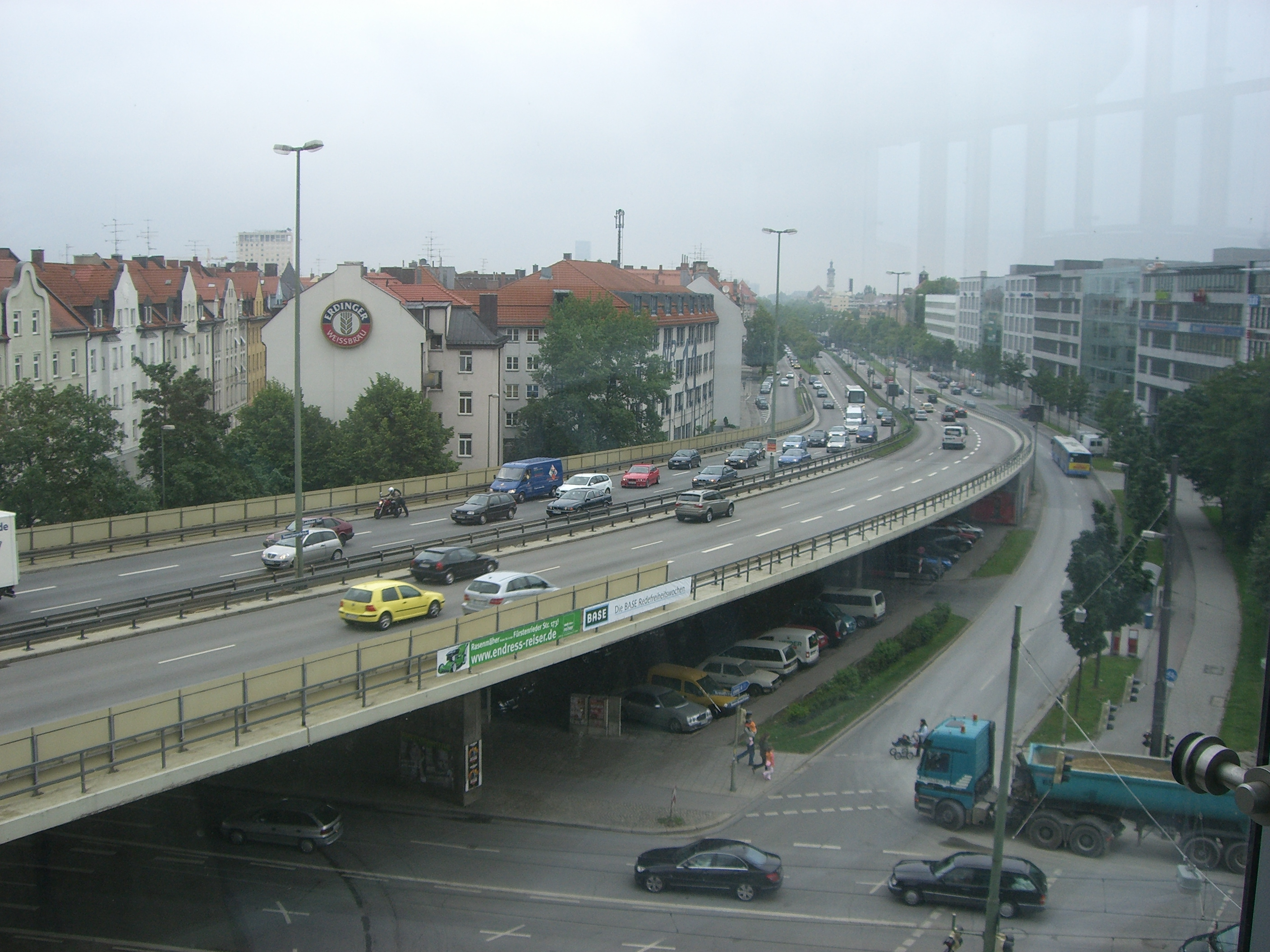 München - Donnersbergerbrücke (Nordauffahrt)